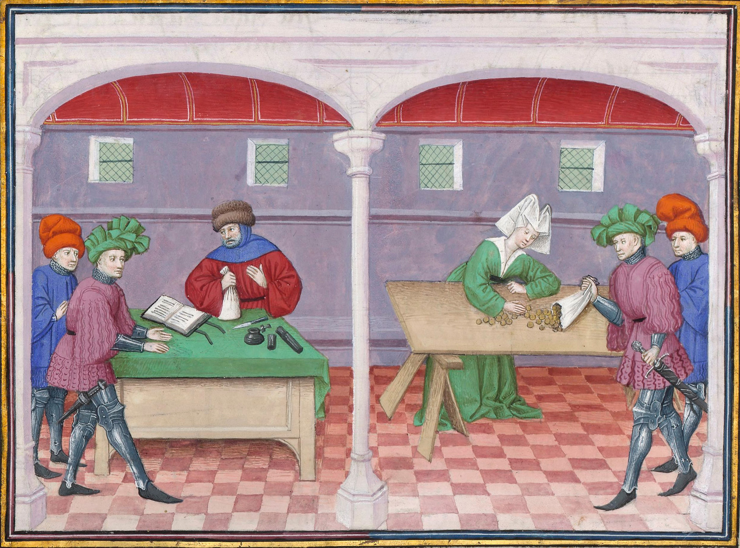 Des nobles déposent ou retirent une bourse de pièces d'or chez un banquier. À droite, la femme du banquier compte les pièces. Enluminure ornant un manuscrit du Décaméron de Boccace, BnF, Bibliothèque de l'Arsenal, Ms-5070 réserve, folio 276, verso.